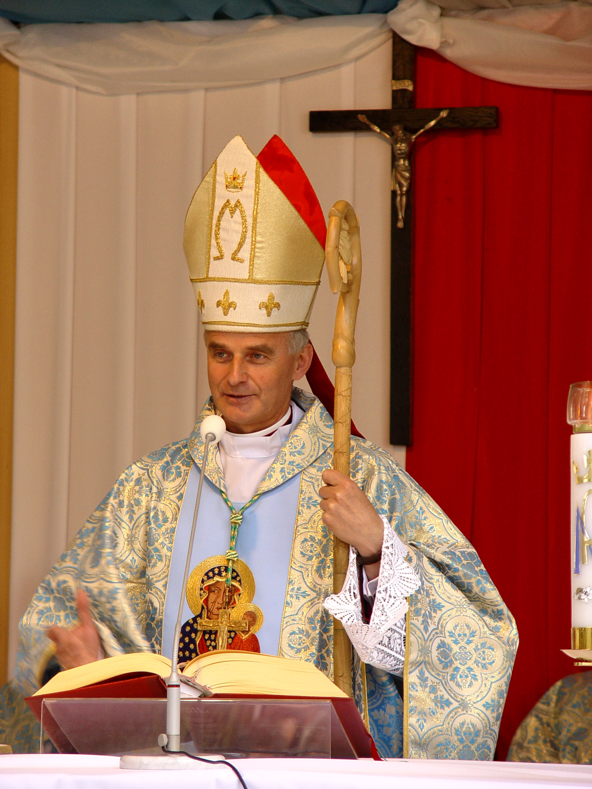 Bp Marian Florczyk - biskup pomocniczych Diecezji Kieleckiej, Nawiedzenie parafii NPNMP w Busku-Zdroju przez kopię Obrazu Matki Boskiej Częstochowskiej, 21 czerwca 2008 r.